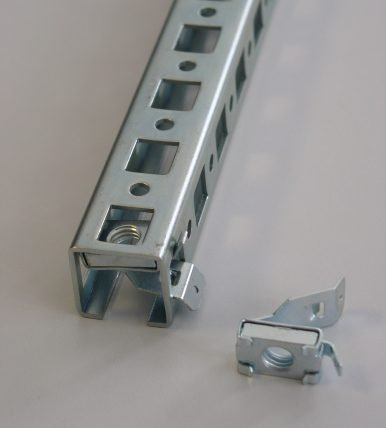 Eine Käfigmutter und eine Systemschiene Andere Versionen: keine